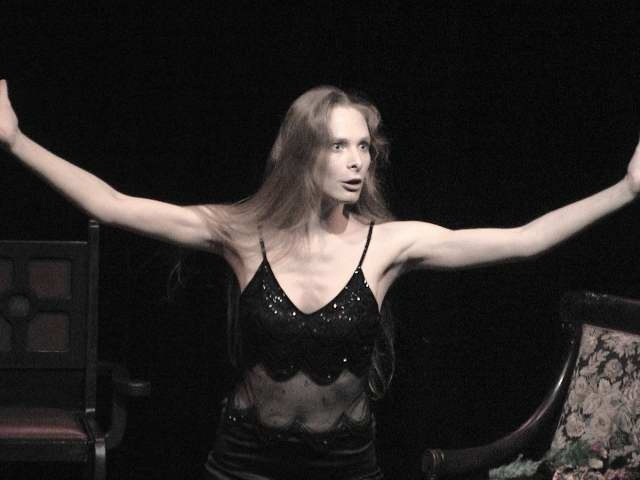 שלומית מנדל במופע קסמים